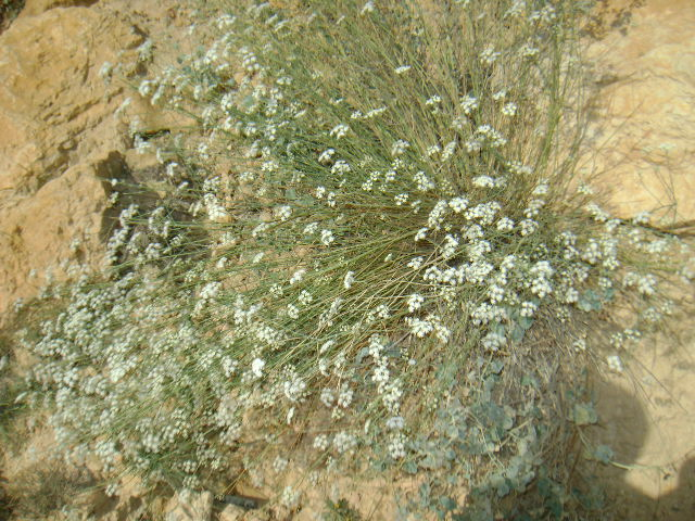 plante spontanée observée dans le flanc sud du Djebel Bir El Haffey